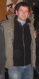 Mikel Urdangarin abeslaria.